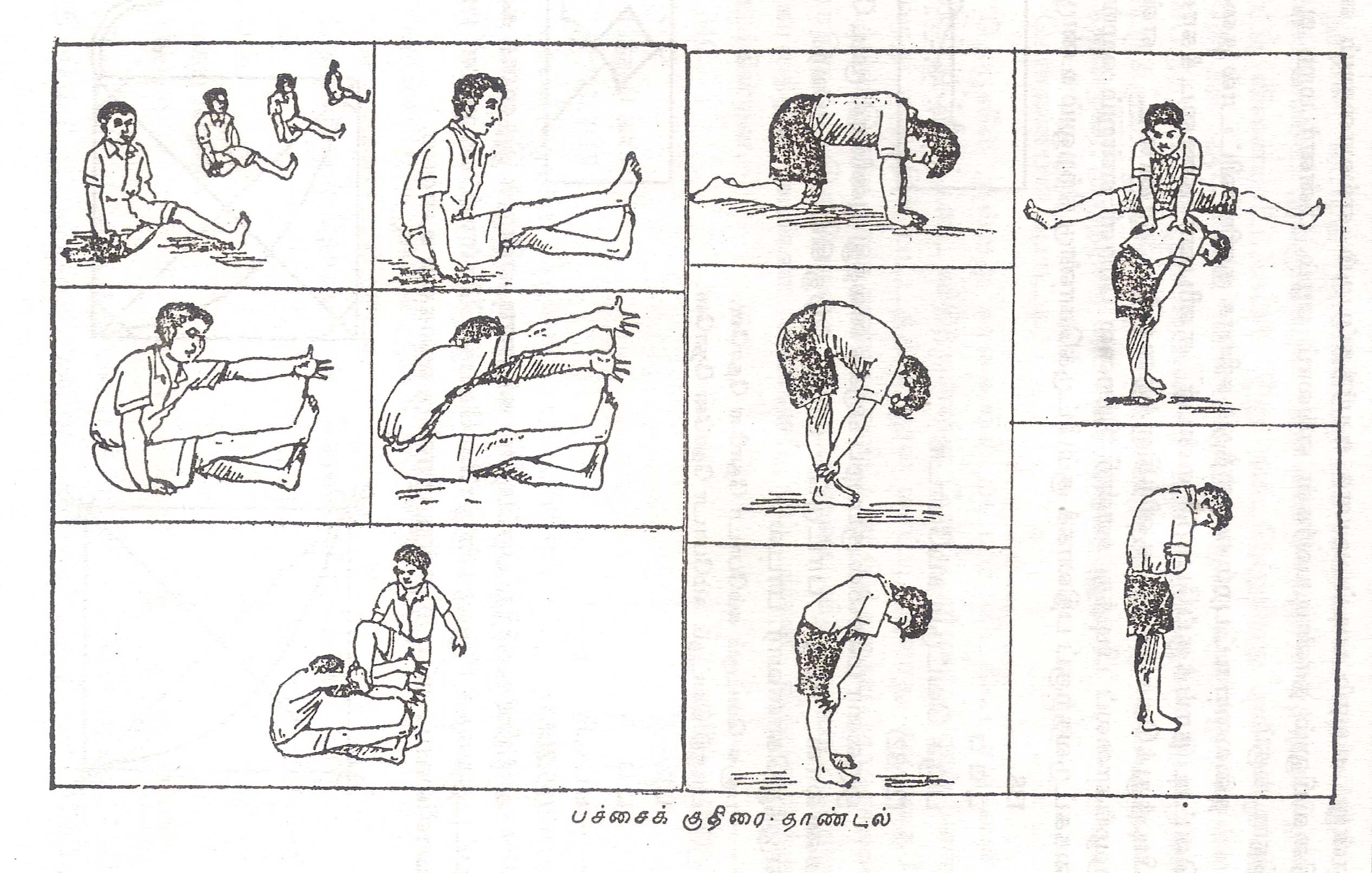 பச்சைக்குதிரை விளையாட்டு, கால்-தாண்டி, ஆள்-தாண்டி, முறைகளைக் காட்டும் கோட்டுருப் படங்கள், மறைகின்ற விளையாட்டுகள் என்னும் எனது நூலிலிருந்து எடுத்துப் பதிவேற்றப்பட்டது.